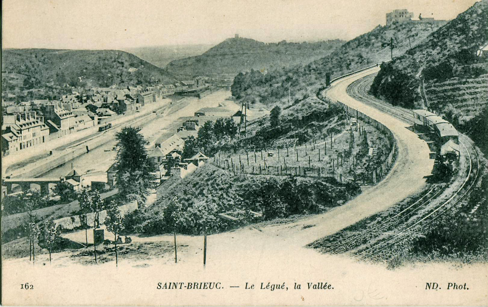 Carte postale ancienne éditée par ND, n°162SAINT-BRIEUC : La vallée du Légué